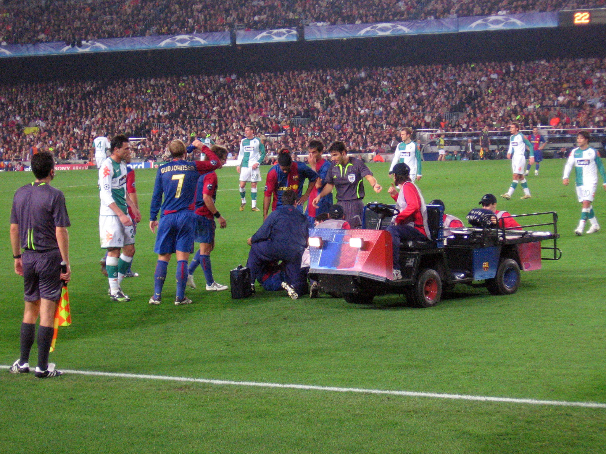 El jugador del Futbol Club Barcelona Andrés Iniesta sufre un leve esguince durante el partido contra el SV Werder Bremen y es atendido por el fisioterapeuta del equipo. Minutos más tarde es sustituido por Xavi Hernández.